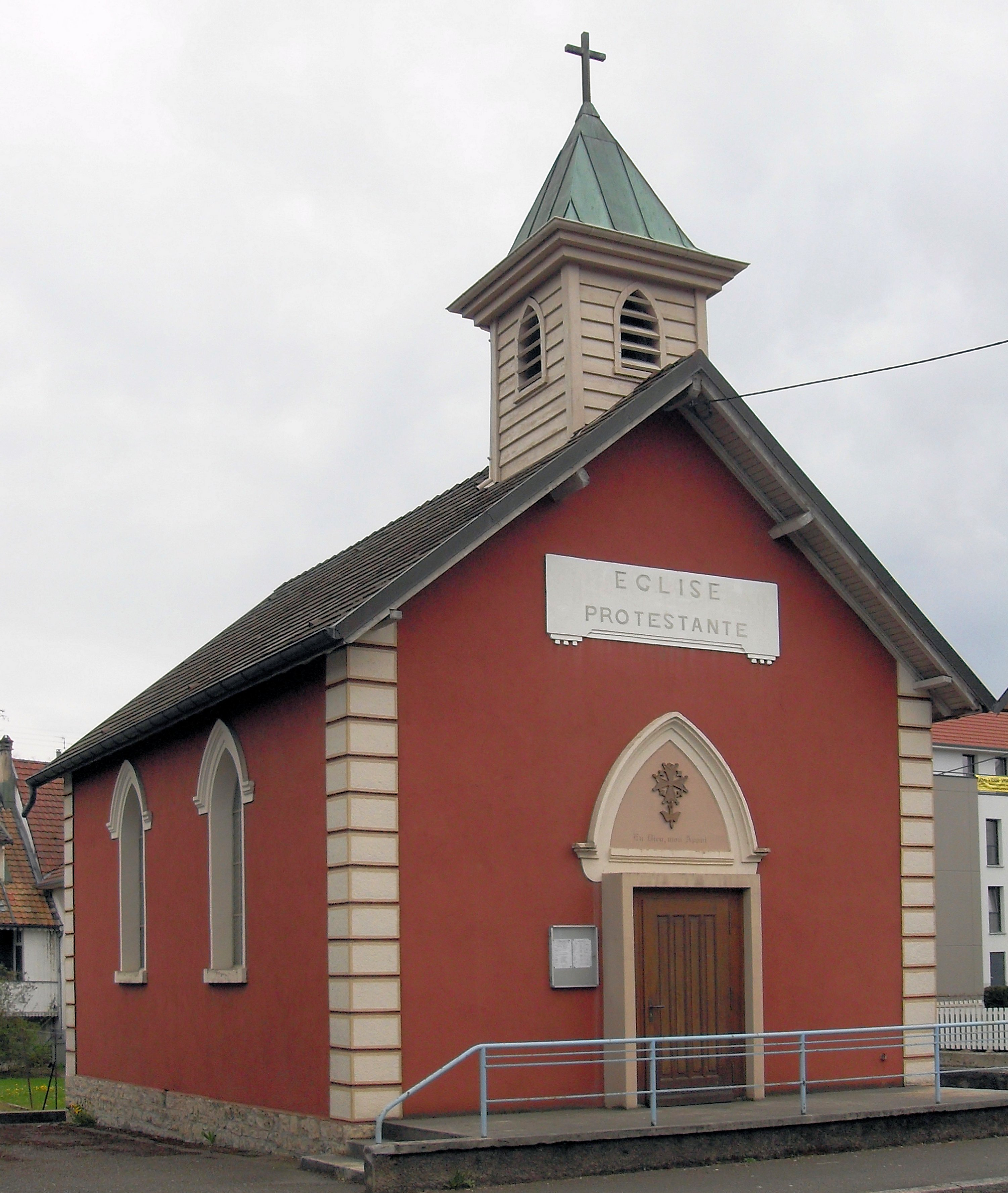 Le temple luthérienne à Delle